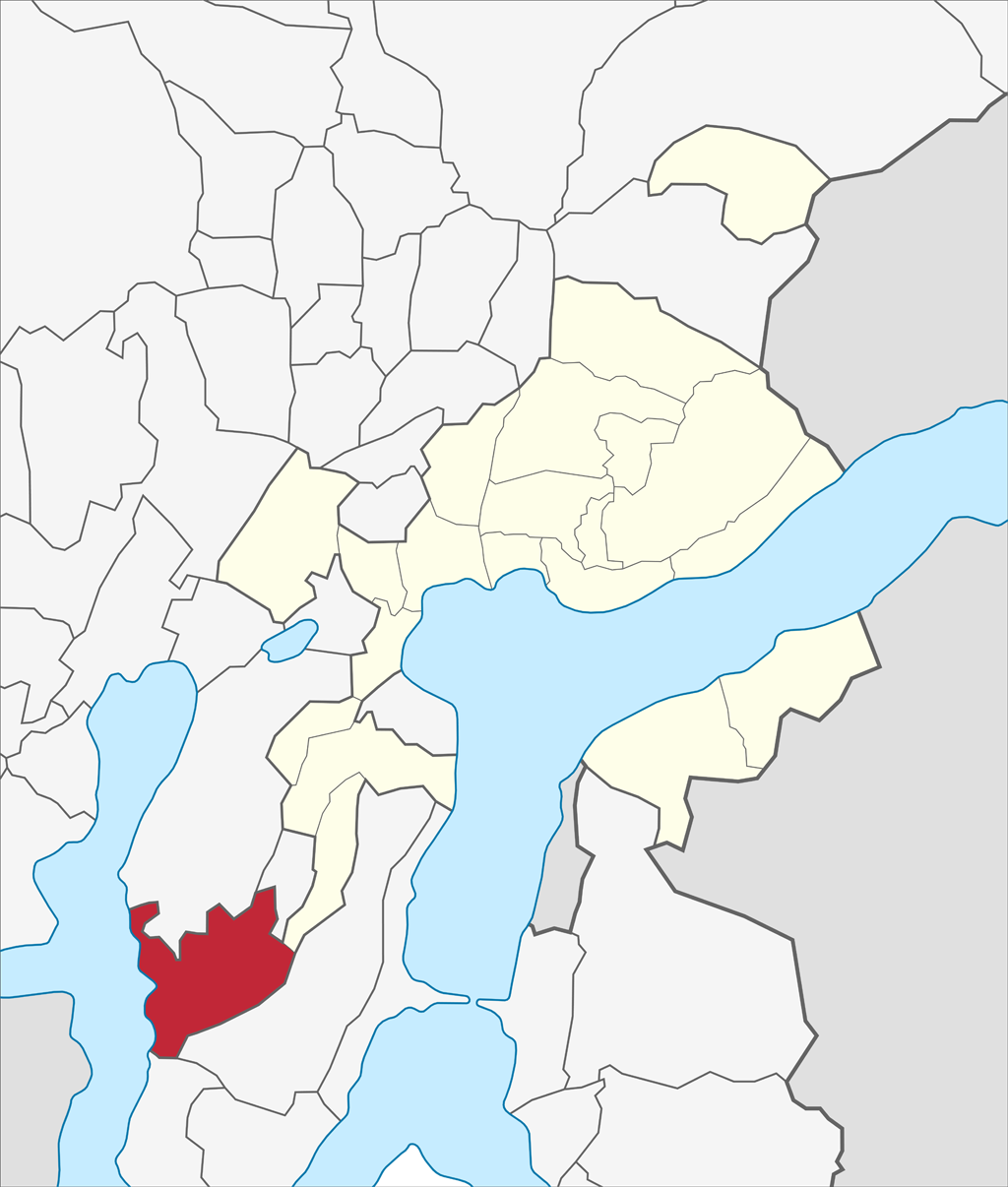 Localizzazione del quartiere di Barbengo nel territorio comunale di Lugano.